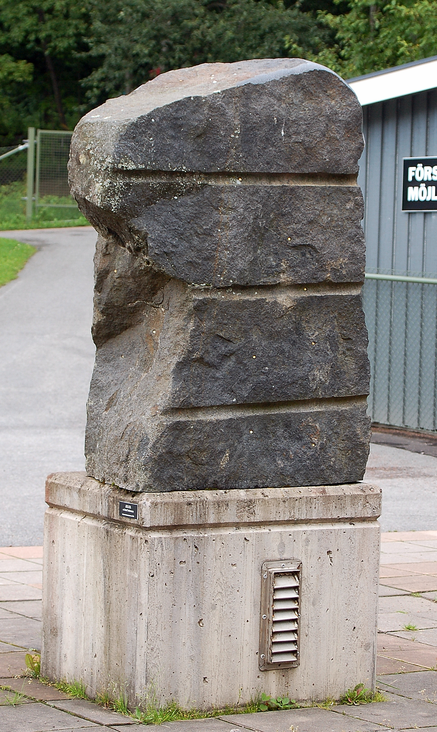 "Aniara" av Calevi Tenhovaara utförd i diabas 2006 placerad utanför Molkoms bibliotek.